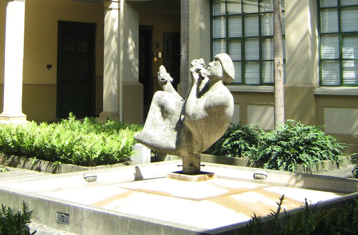 El Flautista, escultura de Rodrigo Arenas Betancurt, Edificio San Ignacio, Medellín, Colombia.